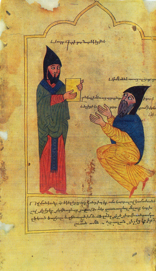 Григор Нарекаци и заказчик Симеон. Миниатюра из “Книги скорбных песнопений” Григора Нарекаци. Мастер Церун. Васпуракан. 1391 г. (Матен. 1874. Л. 1 об.)